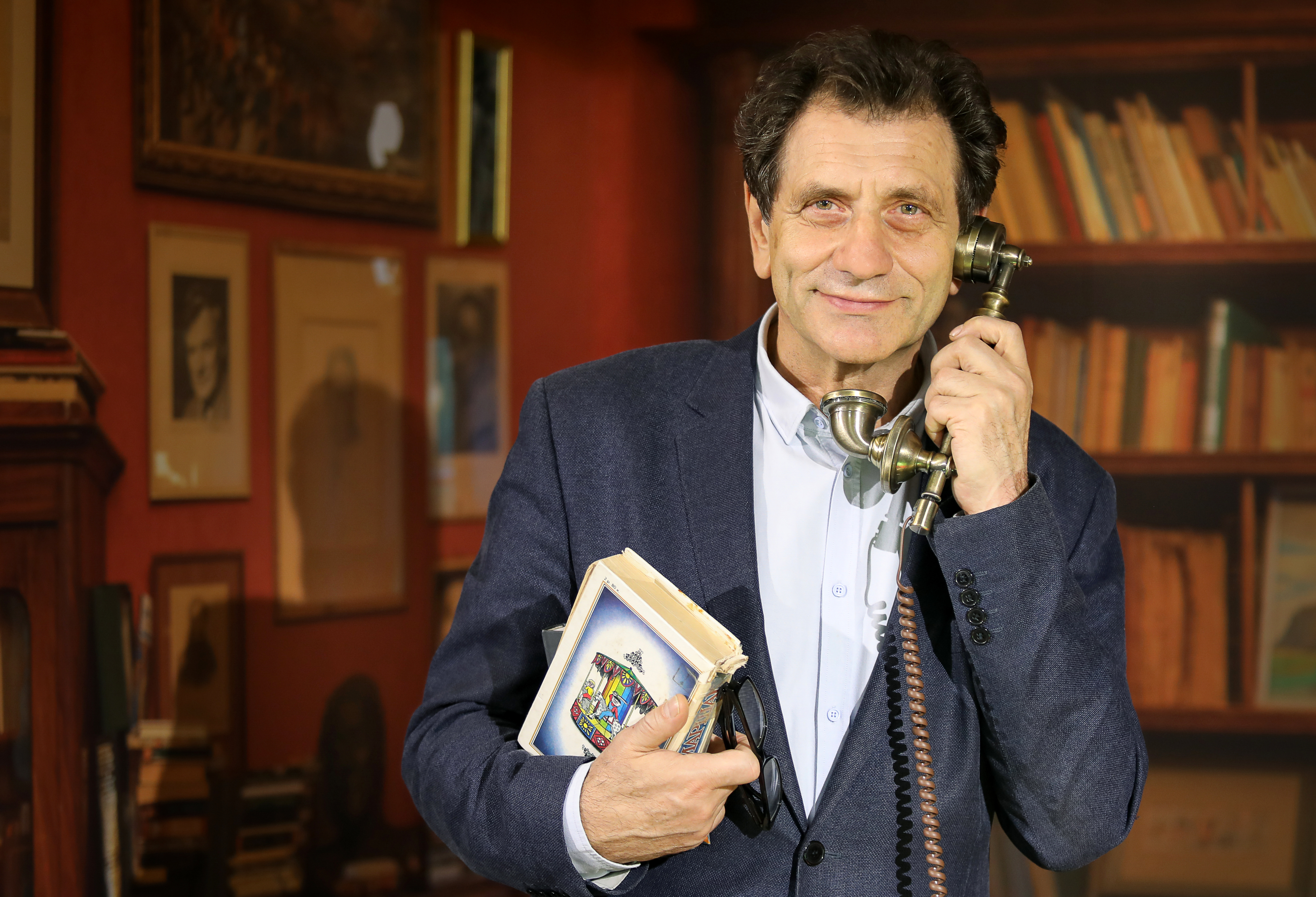 Народный артист РФ Евгений Владимирович Князев на открытии выставки "Маршак" в Российской государственной детской библиотеке.